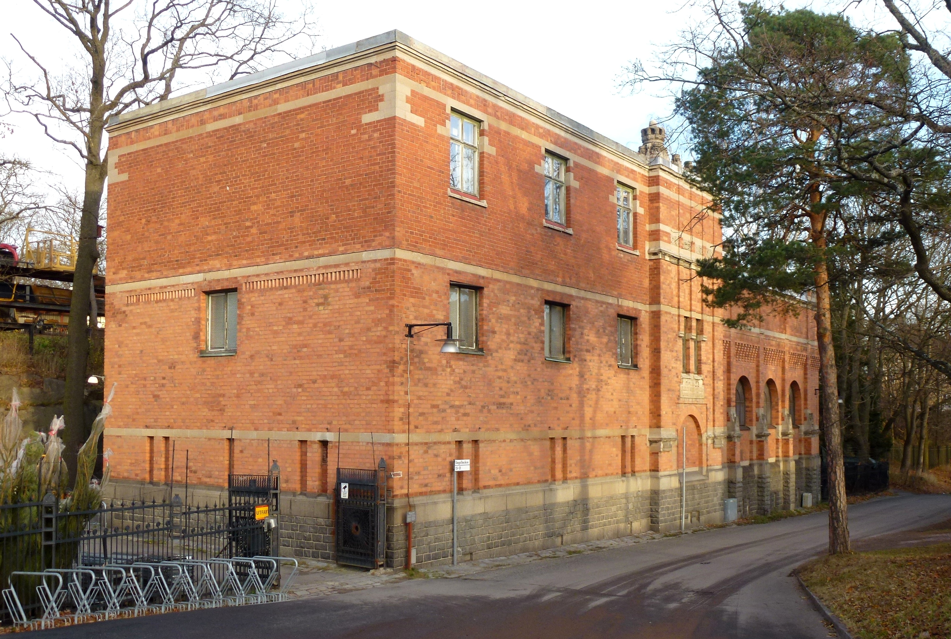 Djurgårdsstationen, Ferdinand Bobergs understation vid Singelbacken 15 på Södra Djurgården